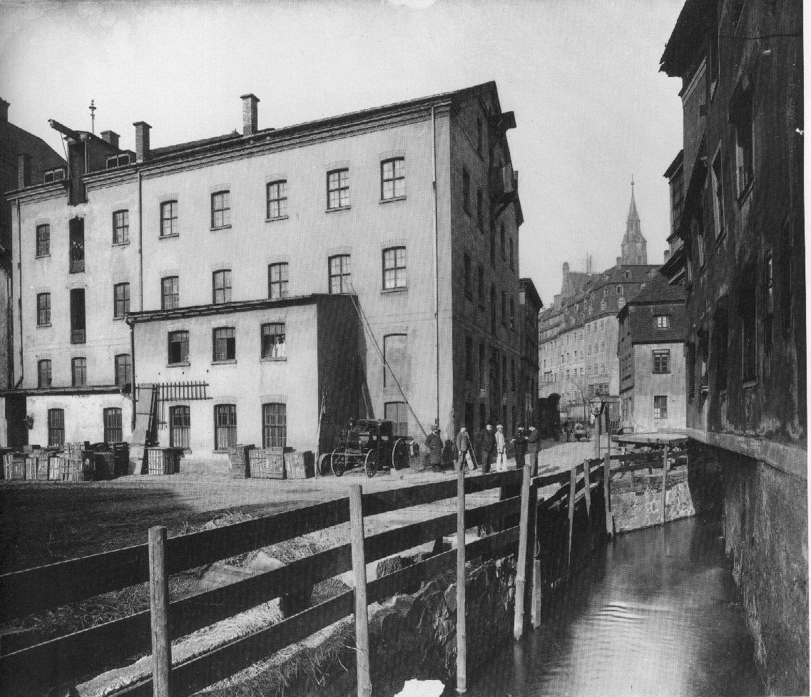 Barfußmühle in Leipzig, An der Pleiße (heute Dittrichring) vor 1898.